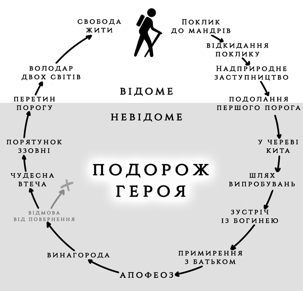 Hero's journey scheme